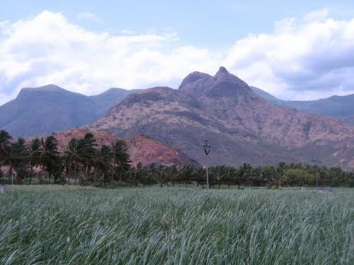 படம்